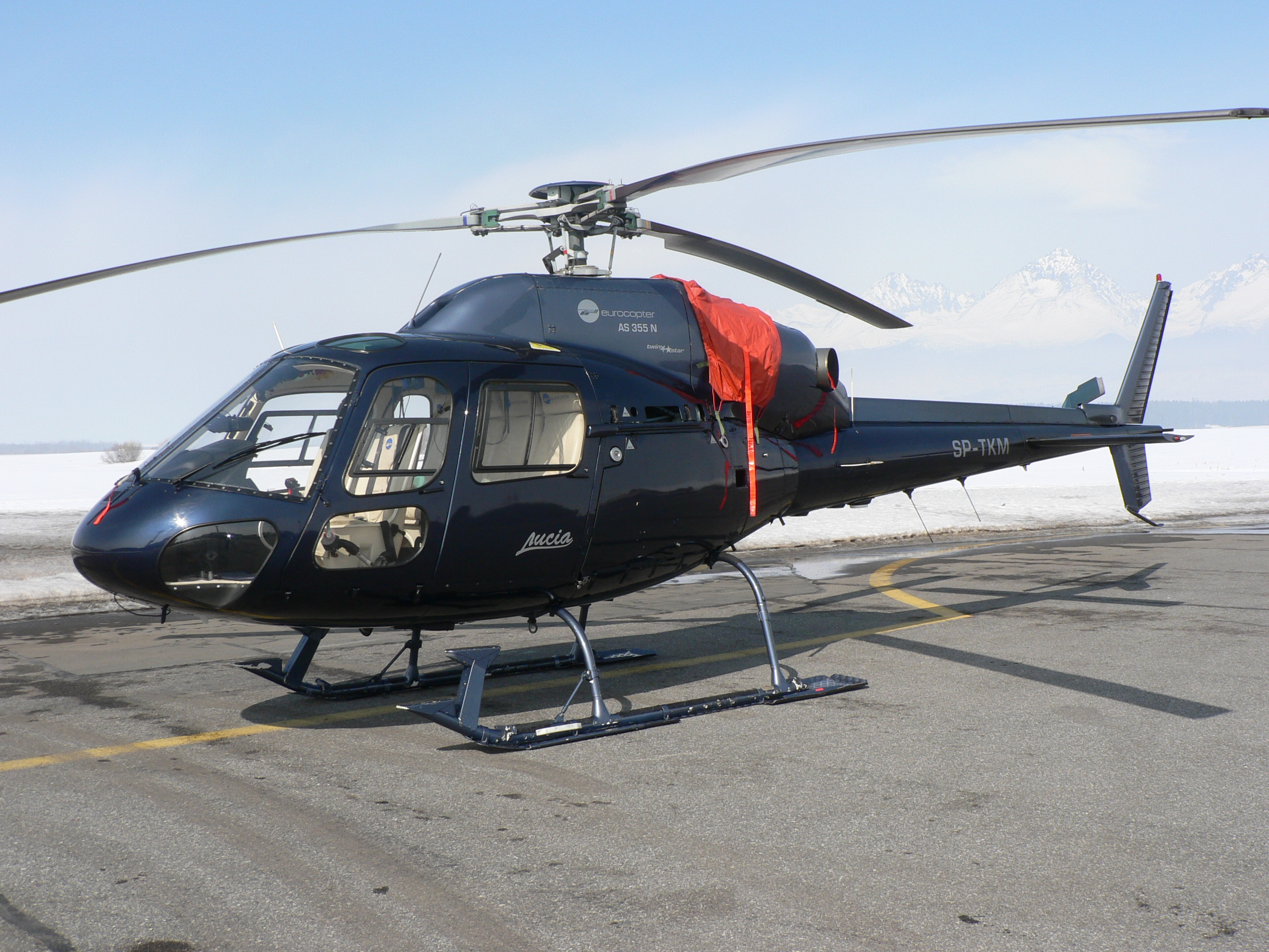 Ecureuil AS 355N OM-ATH popradskej spoločnosti Air Transport Europe , Slovakia